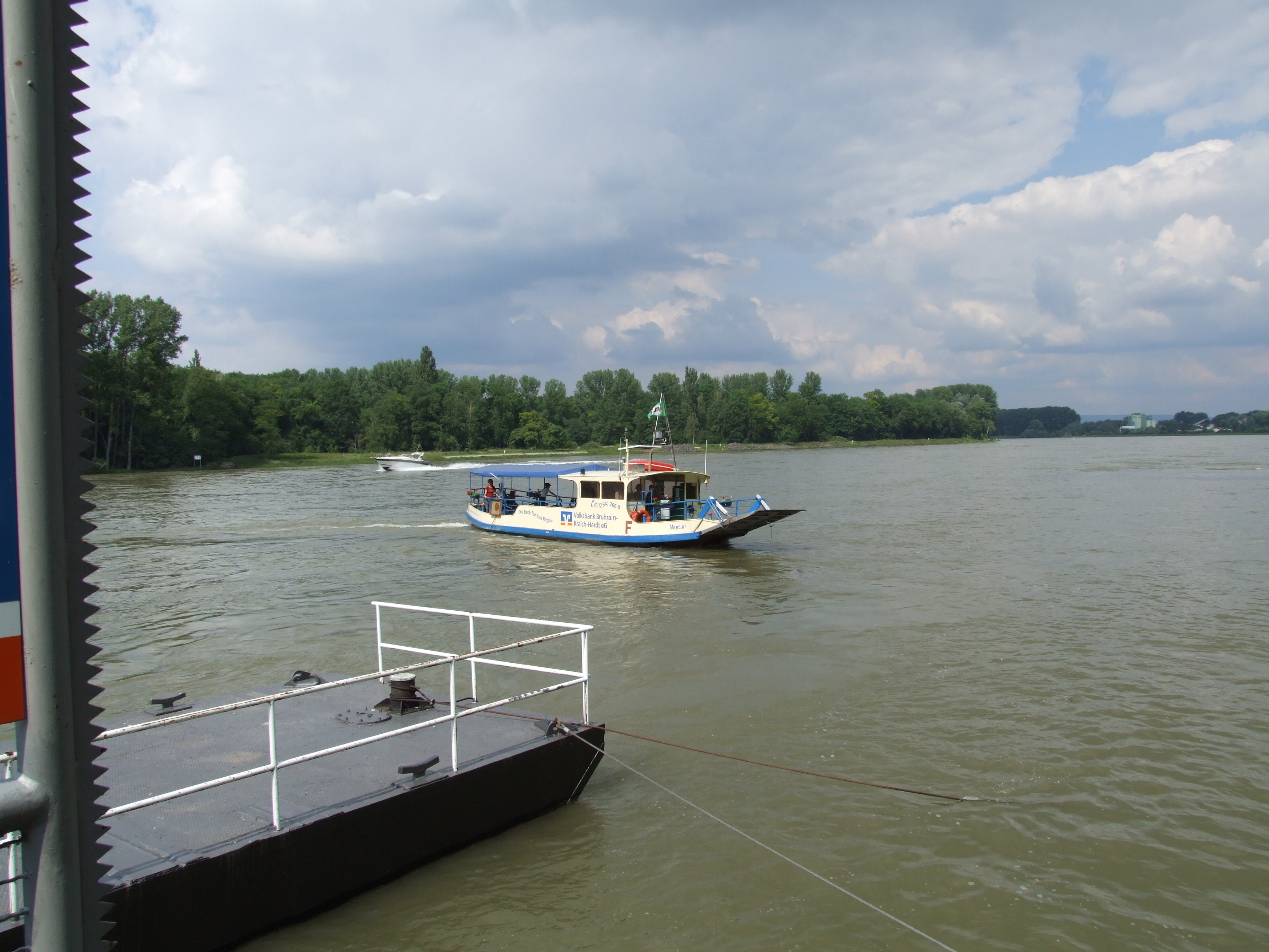 Blick auf das Waldstück "Im Salmengrund" des Speyerer Auwalds von Rheinhausen aus. Im Vordergrund die Rheinhäuser Fähre.